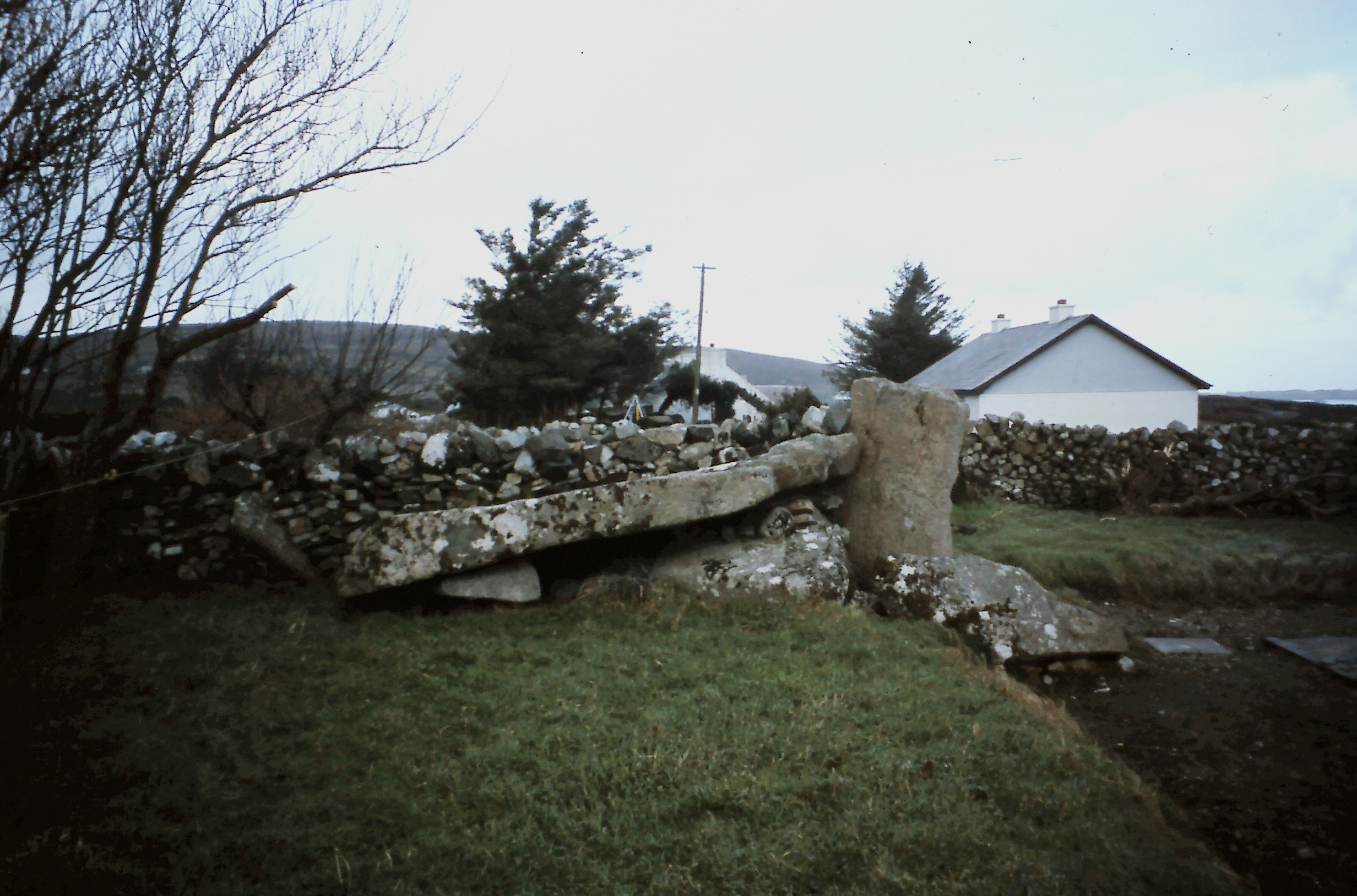 ArdsBeg - Portal Tomb